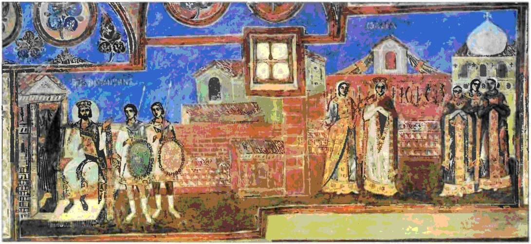 Ольга, княгиня киевская, на приеме у Константина VII Багрянородного. Фреска Софийского собора в Киеве . 1040-е — начало 1050-х гг. Реконструкция С.А. Высотского Реконструкция фрески была проведена С.А. Высотским и художником-реставратором Ю.А. Коренюком. В левой части композиции — император Константин VII Багрянородный, восседающий во дворце на троне, и два его телохранителя, вооруженные копьями и щитами. В правой части изображена княгиня Ольга с женщинами из ее свиты. На голове княгини поверх белого прозрачного плата надета стемма, но не корона, которую по византийскому праву могли носить только императрицы. Кроме того, Ольга стоит, в то время как Константин сидит. В соответствии с придворным этикетом, в присутствии императора всем полагалось стоять, скрестив руки на груди и опустив рукава. Право же сидеть при императоре считалось исключительной привилегией, которая изредка предоставлялась коронованным особам при частной аудиенции у басилевса.